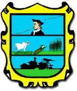 escudo de armas de Xicotencatl Tamaulipas